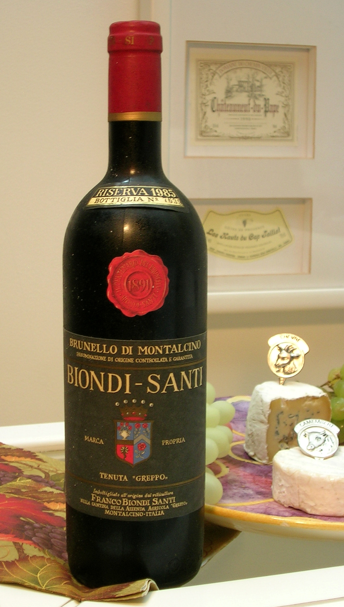 Garrafa de vinho Brunello di Montalcino de Biondi Santi - 1985